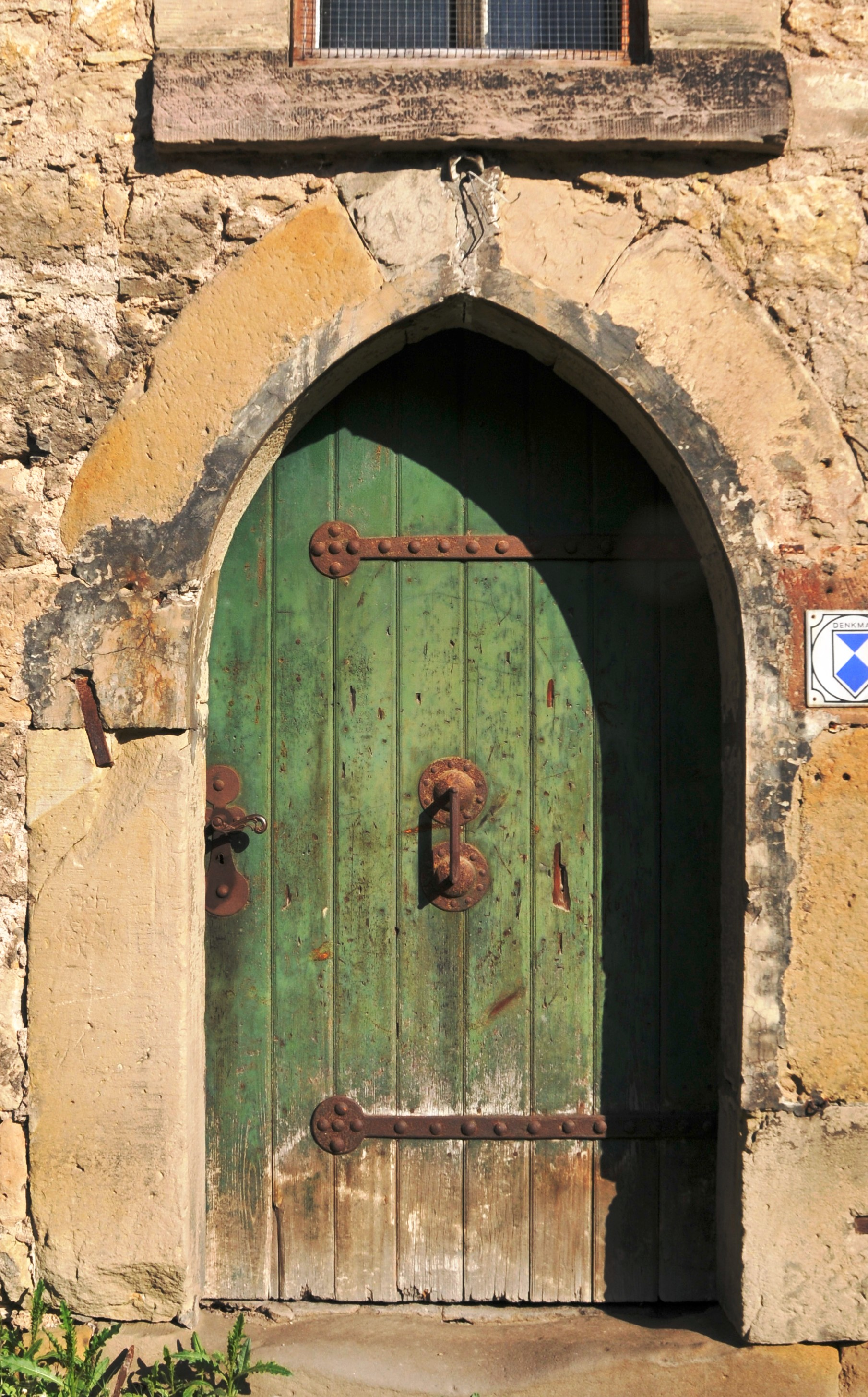 Stadtilm, Zinsboden, altes Tor